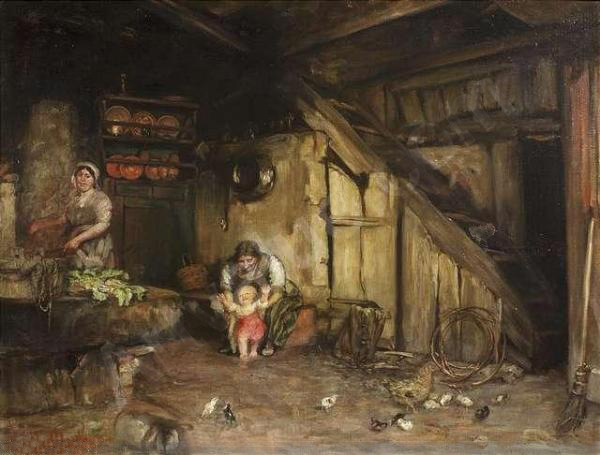 Alle Vögel fliegen hoch. Bäuerliches Kücheninterieur mit Großmutter und Kind zusammen spielend, während die Mutter am Herd eine Mahlzeit zubereitet